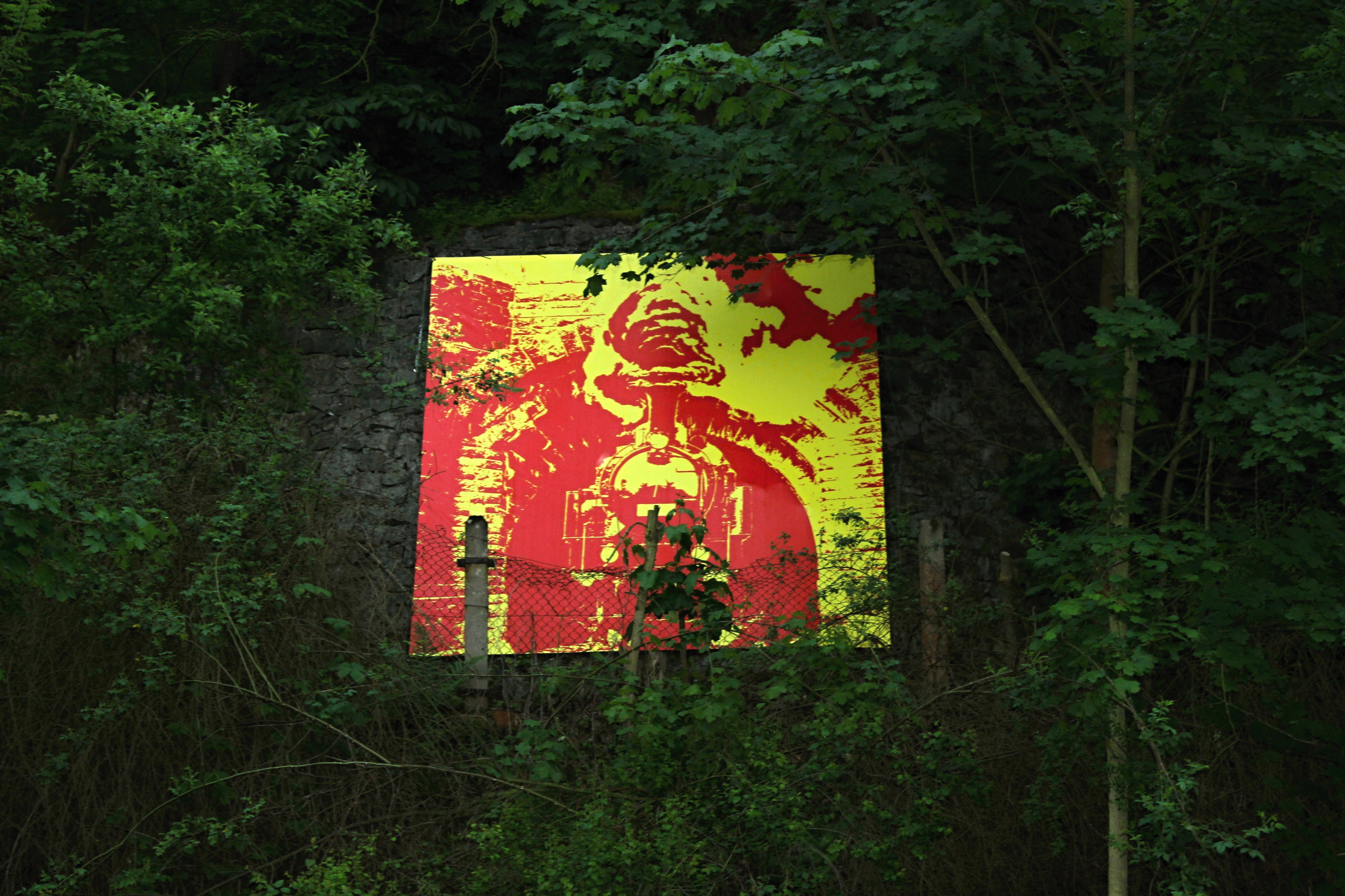 Davle - detail torzo tunelu z natáčení filmu Most u Remagenu